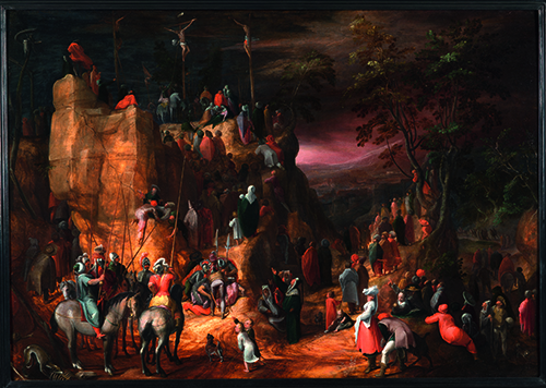 Karel van Mander, Cavalrie, 1592, olieverf op paneel, 75,2 x 107 cm.